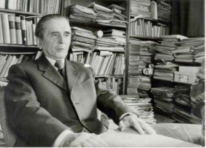 Lojze Ude 2